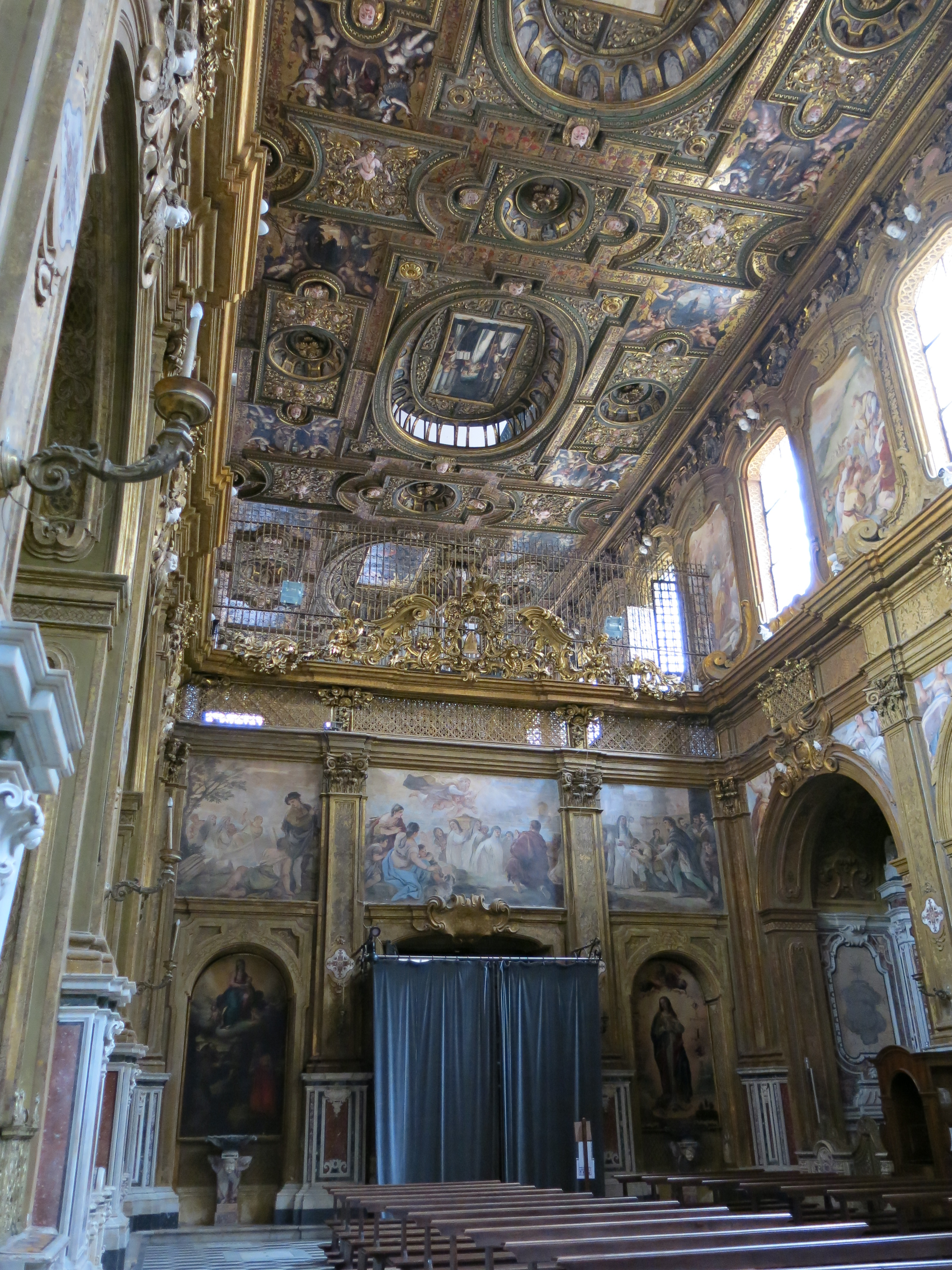 Le chiese di Napoli